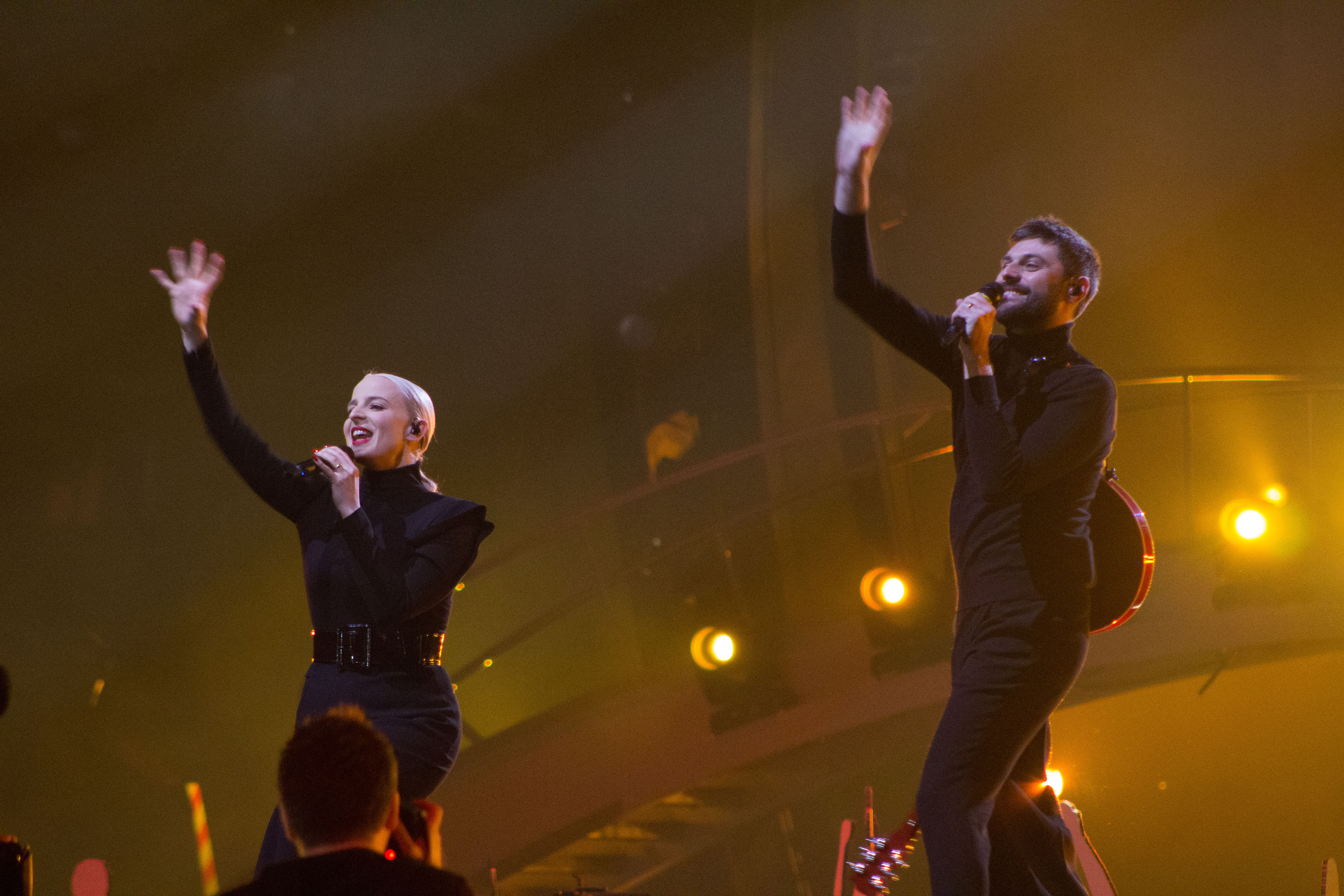 Madame Monsieur interprétant la chanson Mercy, lors des répétitions de la 63e édition du Concours Eurovision de la chanson, à Lisbonne, en mai 2018.